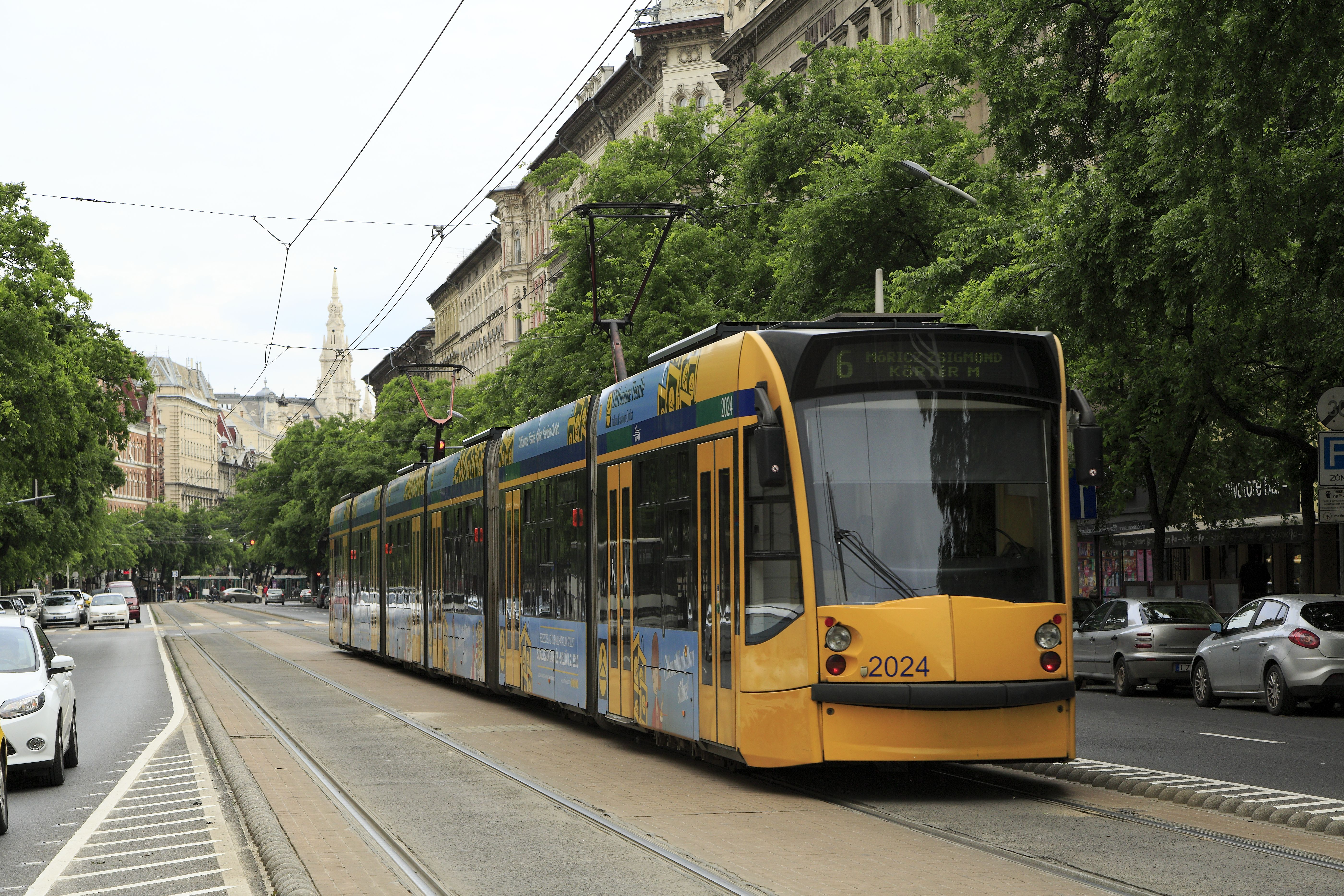 »Combino Plus« auf der Budapester Linie 6 Richtung Móricz Zsigmond Körtér, Nachschuss. Diese Einheiten weichen von den sonstigen Combino ab, es gibt keine laufwerkslosen Segmente, das zweite und vierte Gelenk erlauben einen Querversatz und die Laufwerke sind gegenüber den Kastensegmenten ausdrehbar.